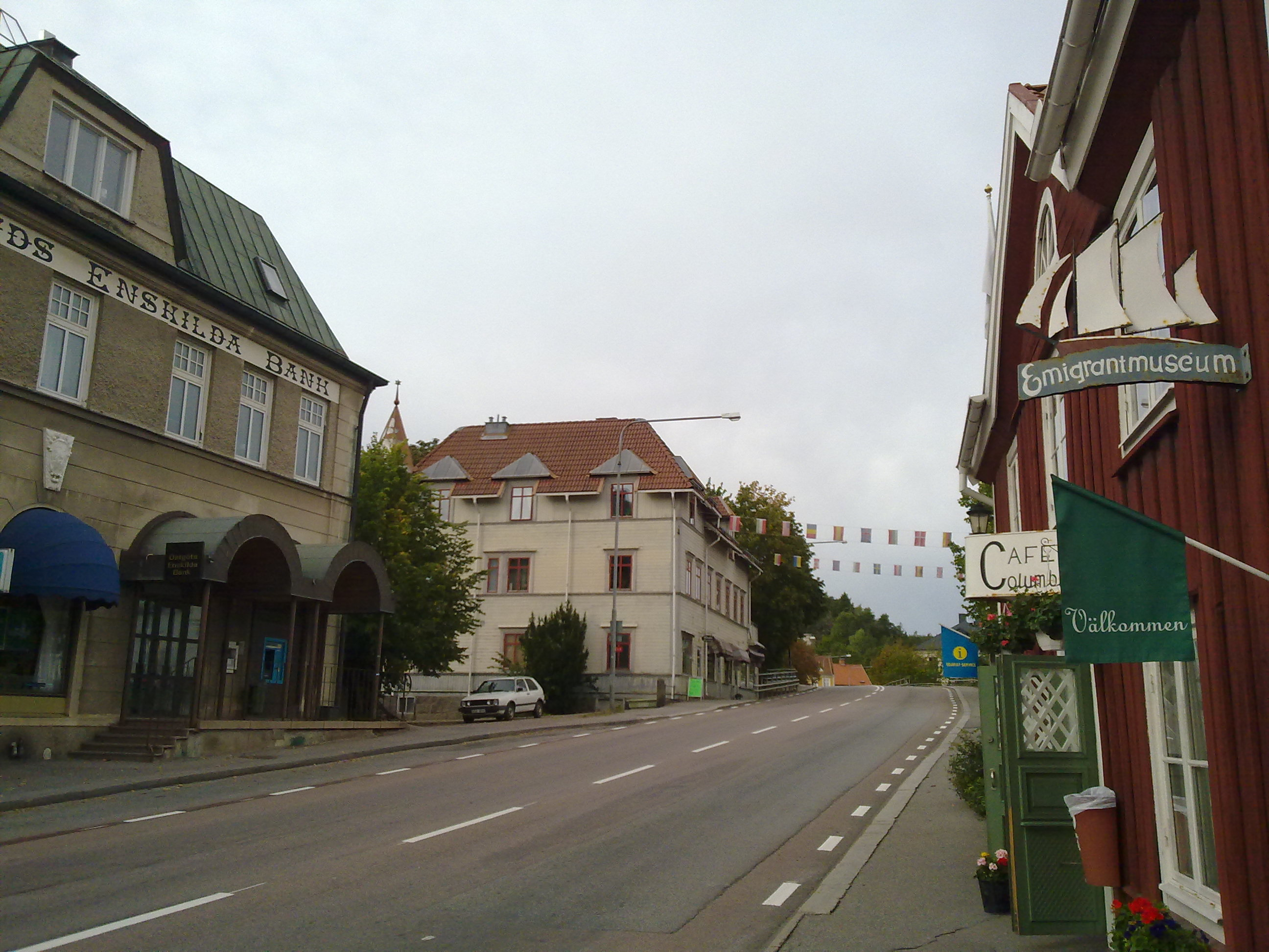 Storgatan i Kisa, 2009.